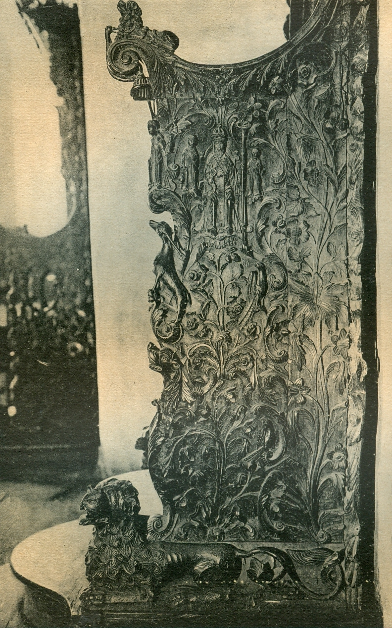 Резба от Владишкия трон в манастира "Свети Йоан Предтеча" (Бигорския манастир), дело на Петре Гарката и неговите помощници. Фотограф Г. Трайчев. От: Албум "Бигорския монастир "Св. Иван Предтеча", София б.д.